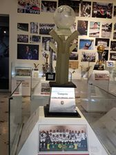 Taça da Copa do Brasil de Futebol de 2007